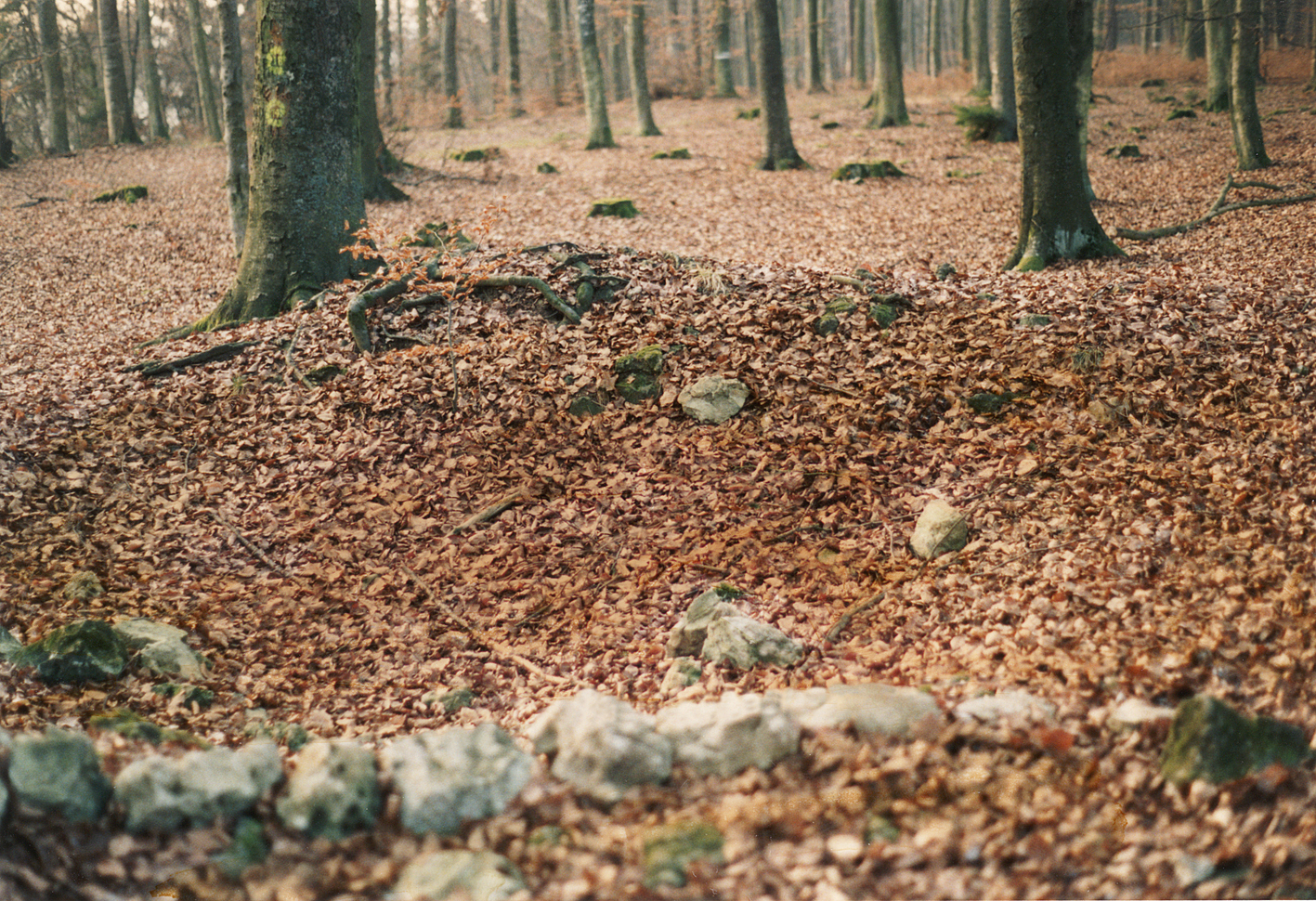 Der Steinturm Wp 14/78 an der rätischen Limesmauer. Von hier aus hatte man in der Römerzeit im Süden Blickkontakt zum Kastell Böhming, das tief unten im Altmühltal lag. This is a photograph of an architectural monument.